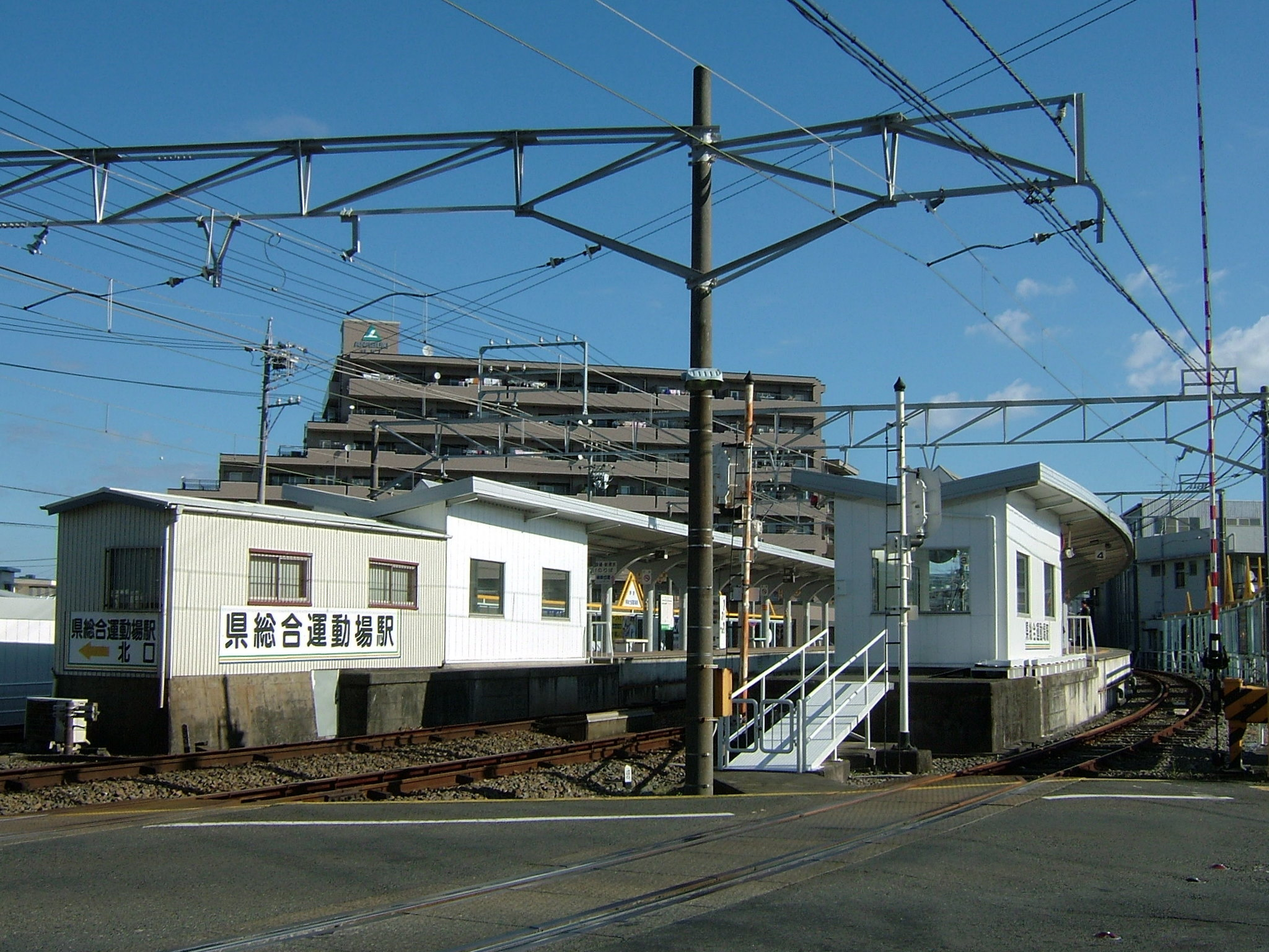 静岡鉄道静岡清水線県総合運動場駅